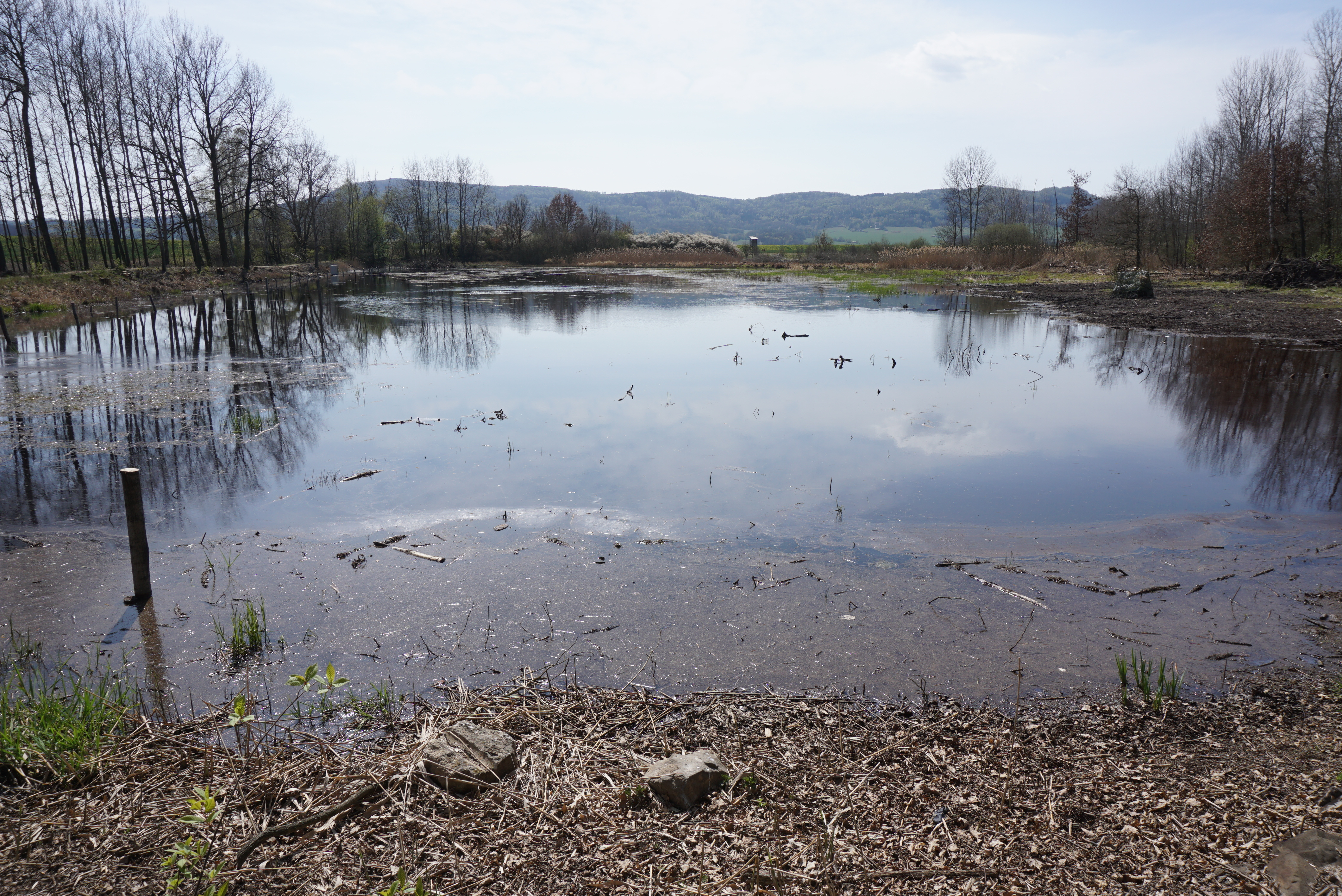 PP Stružnické rybníky (duben 2020)